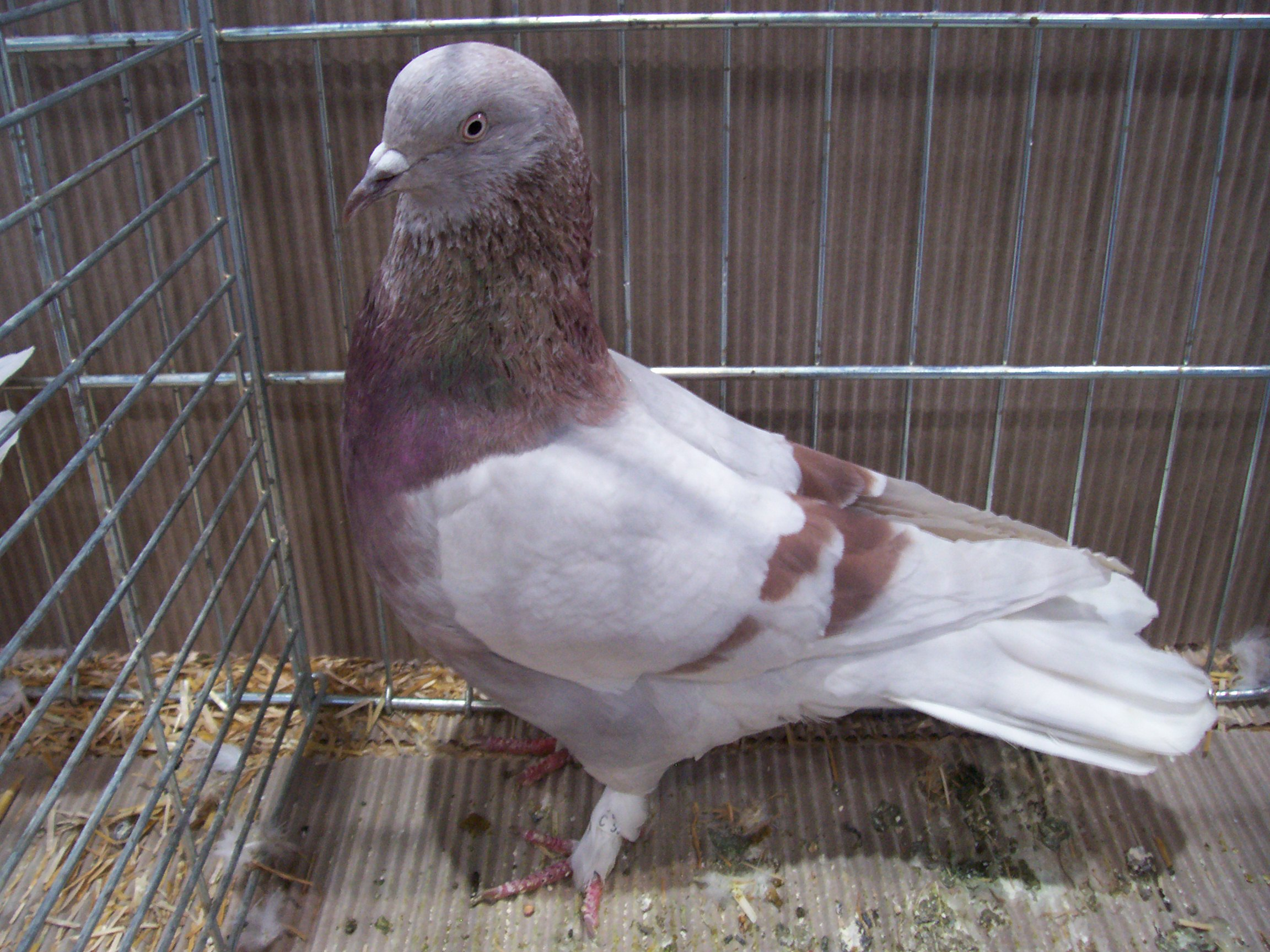 Schmöllner Trommeltaube, Rotfahl